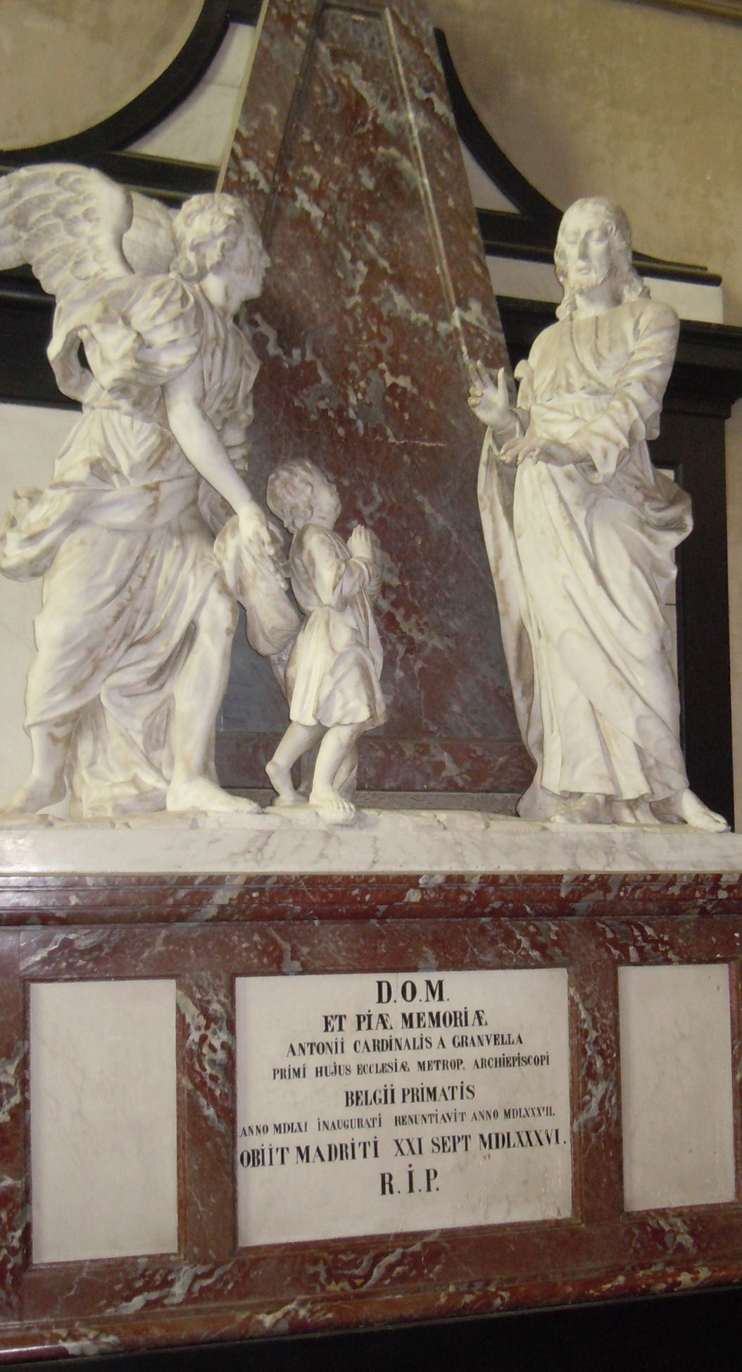 Tombes Kathedraal